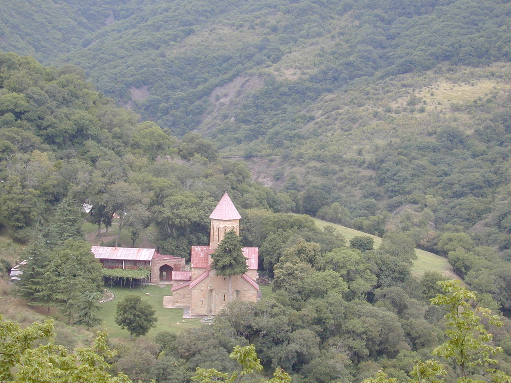 ბეთანია